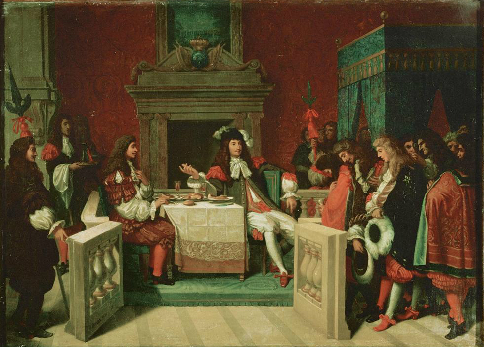 Esquisse pour le tableau le Déjeuner de Molière, qui fut détruit en 1871 au palais des Tuileries. (Bibliothèque-musée de la Comédie-Française, Paris.)